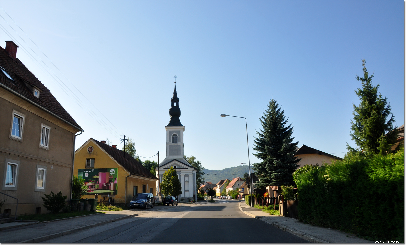 Brezice